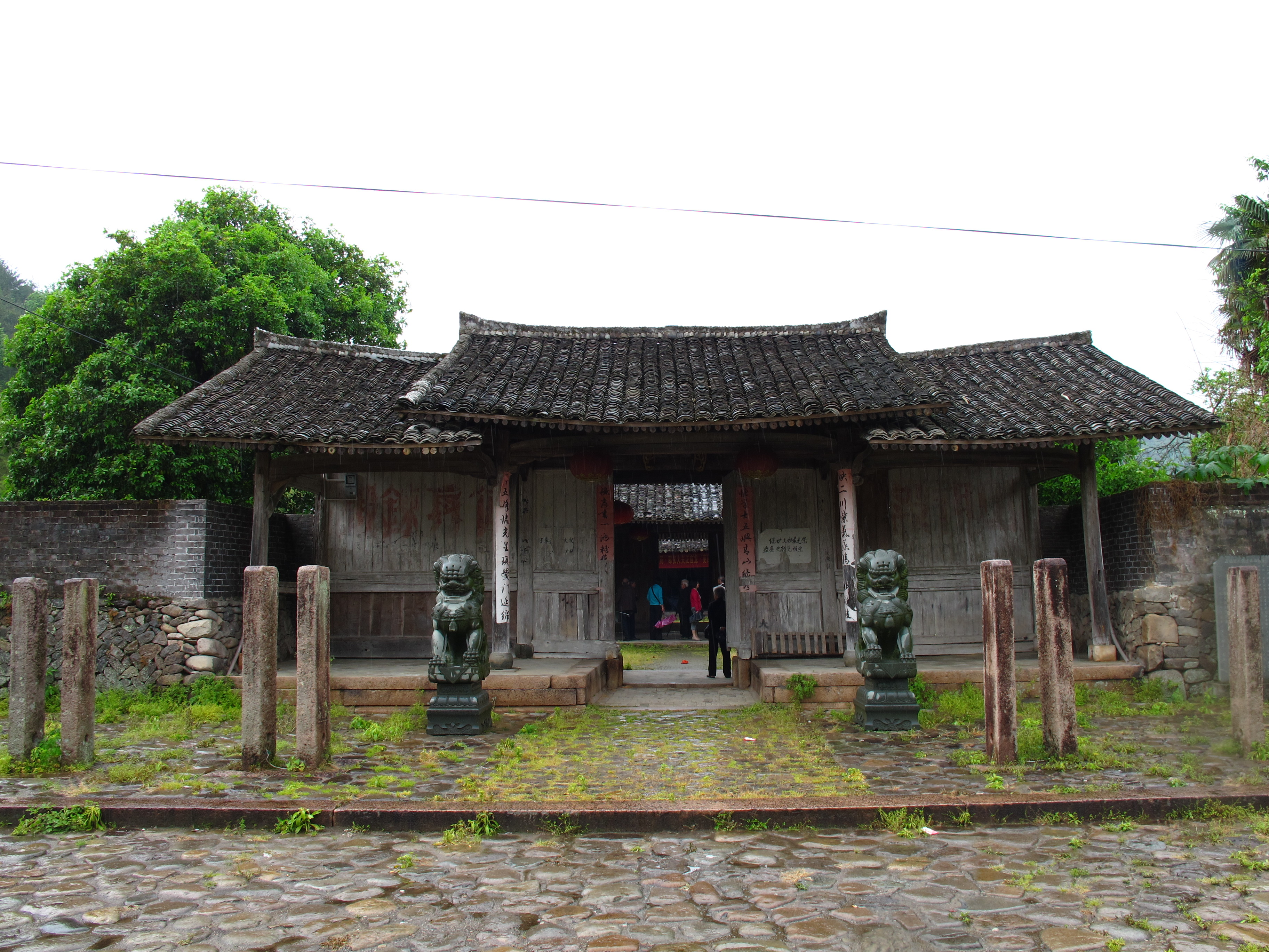 屿北古村汪尚书祠堂正门